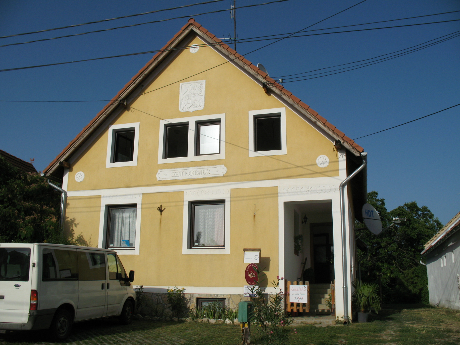 Óbudavár